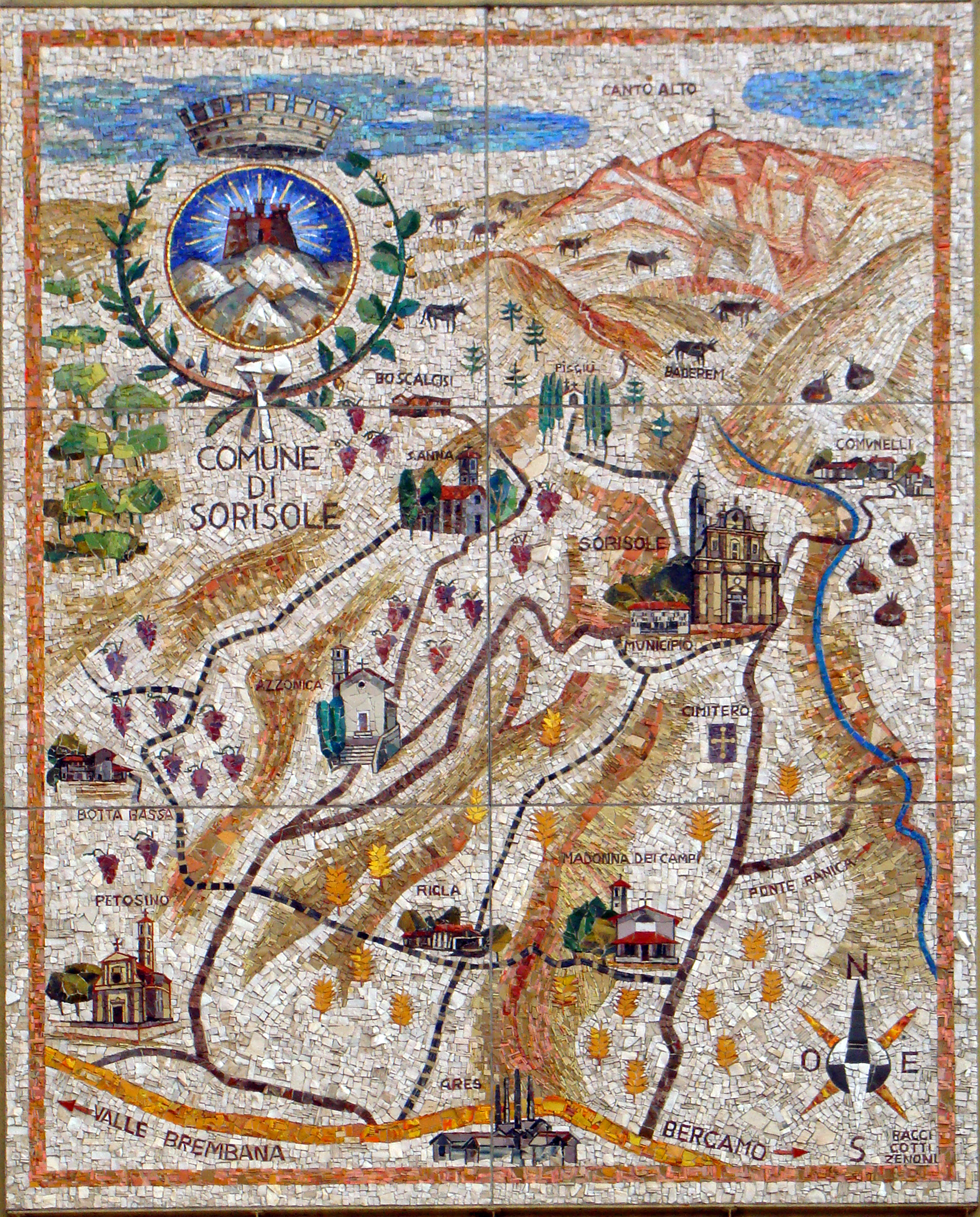 mosaico in Piazza Alpini a Sorisole provincia di Bergamo